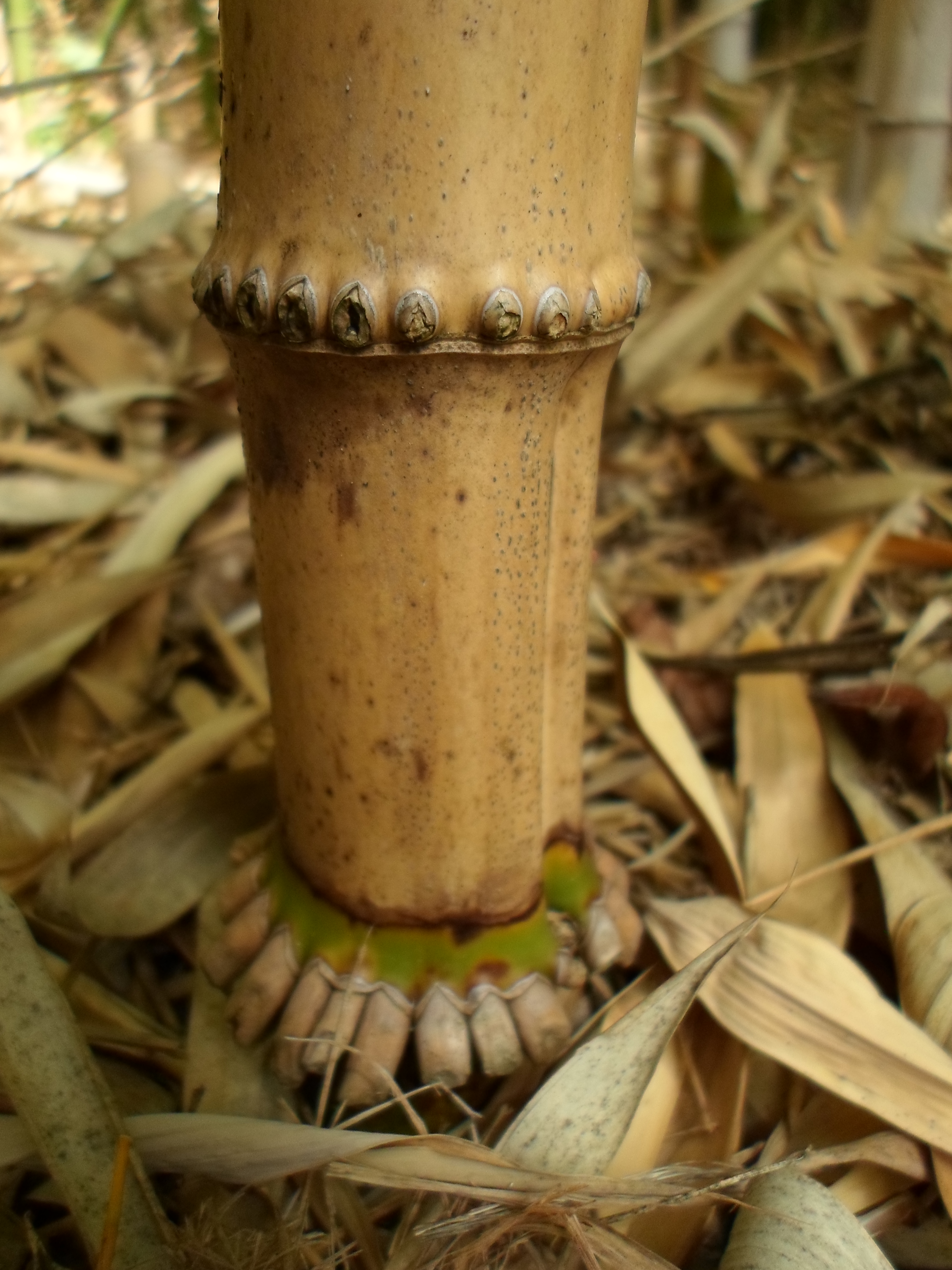 Pied de chaume de bambo